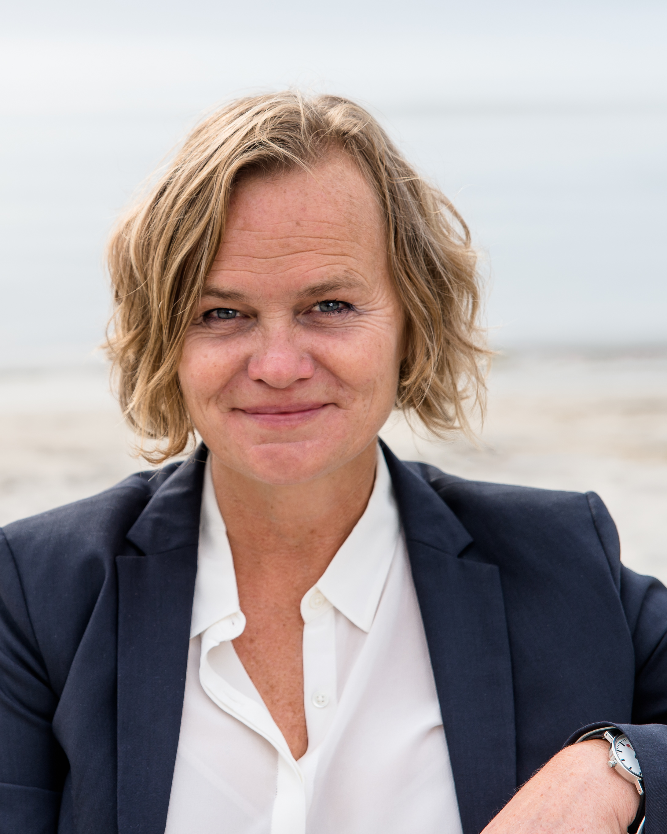 Daglig leder av Eyde-klyngen